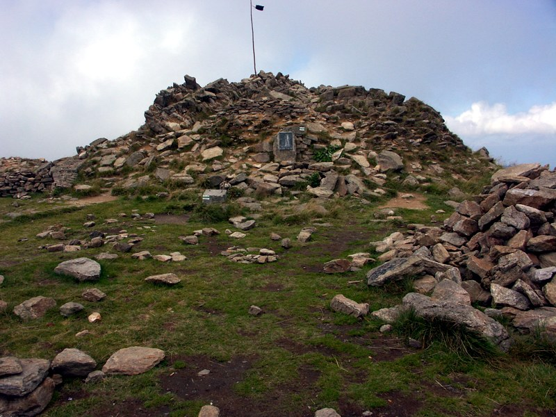 Pozostałosci po kamiennej wieży na szczycie góry Śnieżnik (Sudety Wschodnie)